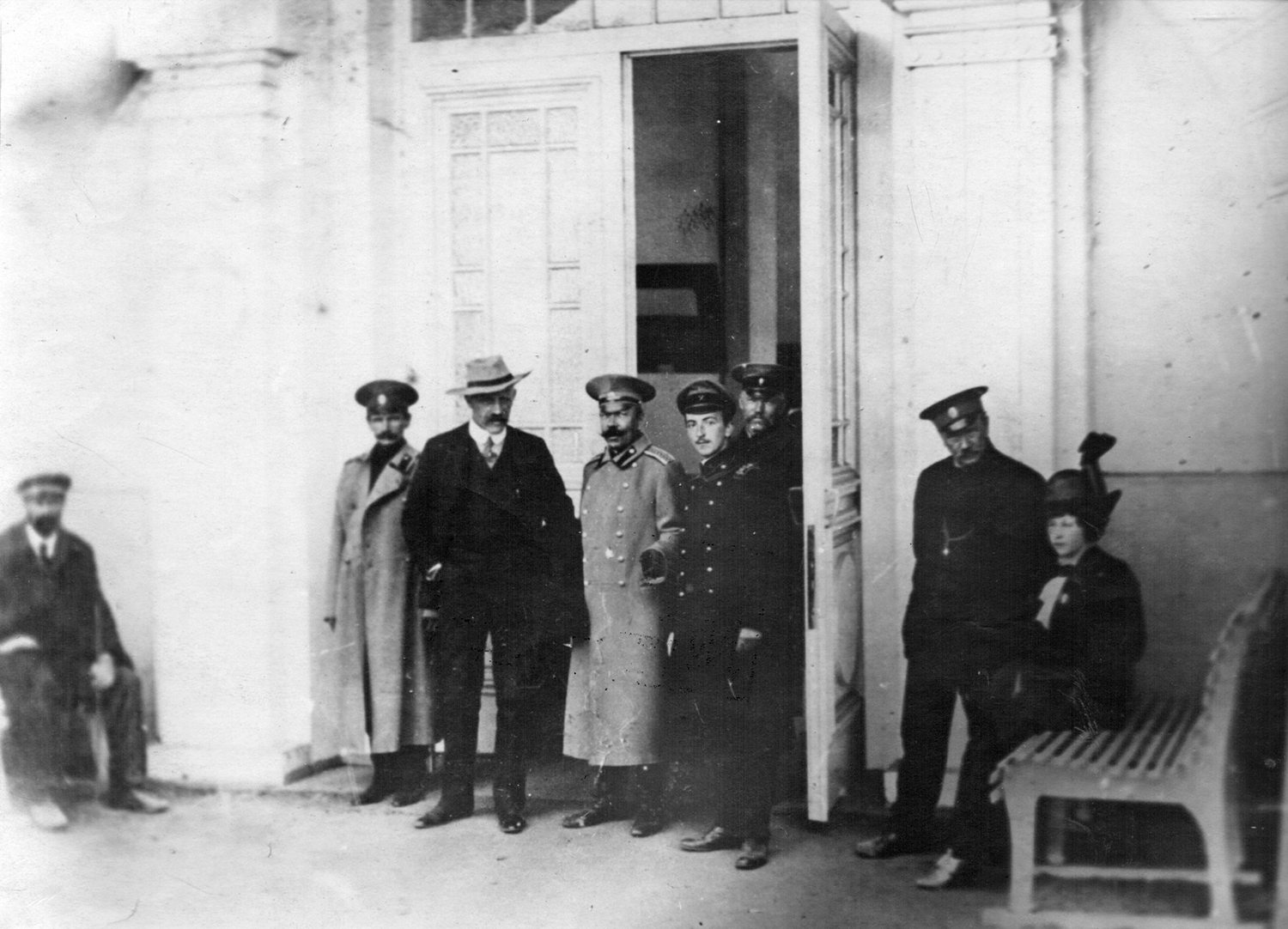 В. К. Арсеньев (слева) и Фритьоф Нансен на железнодорожном вокзале Хабаровска (фрагмент фотографии). 6 октября 1913 года (по старому стилю)